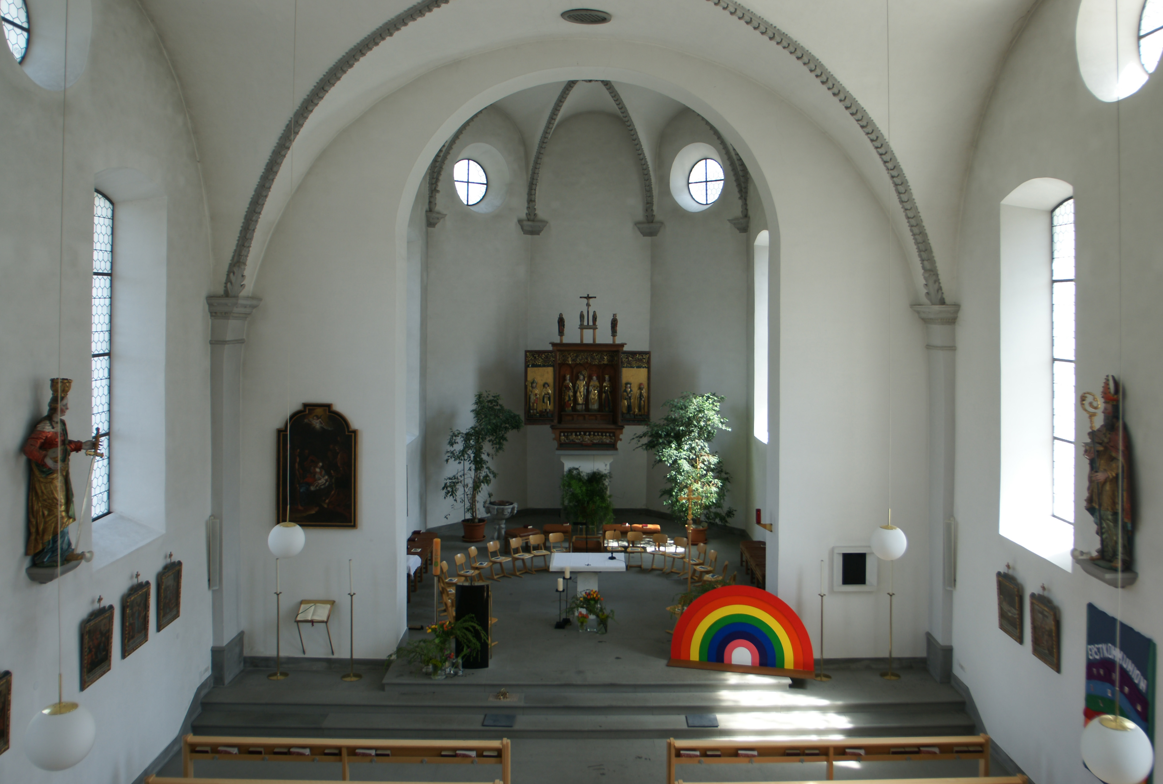 Pfarrkirche "Unsere Liebe Frau Unbefleckte Empfängnis" in Schlins, Vorarlberg.